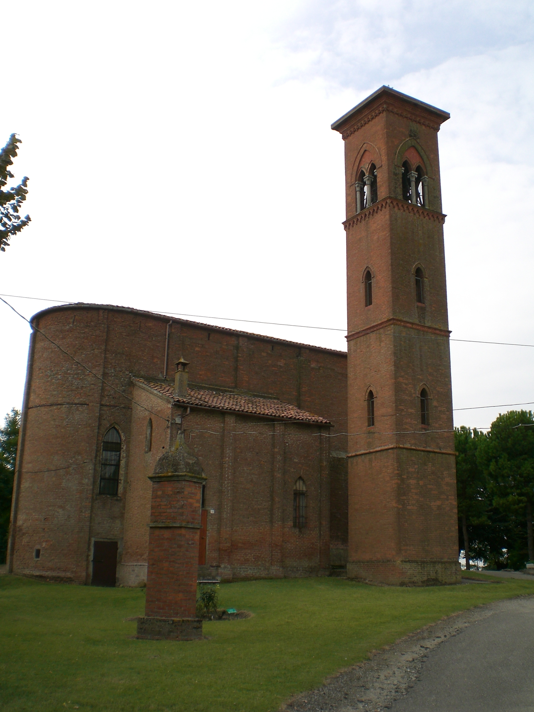 Sant'Egidio, frazione di Ferrara: il Santuario della Beata Vergine Maria Annunciata, detta del Poggetto.